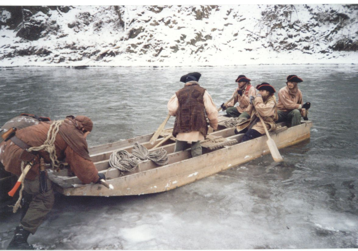 Fotografia z zimowego spływu Akademii Przygody drewnianymi łodziami.